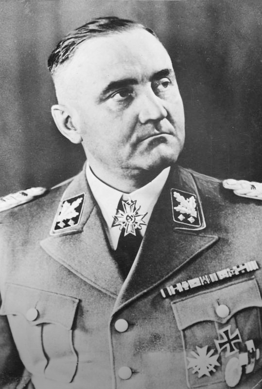 ADN-ZB Gottlob Berger, SS-Obergruppenführer und General der Waffen-SS, Leiter des SS-Führungshauptamtes, ab 1940 Chef des SS-Hauptamtes Erbwesen für Waffen-SS in Berlin. Er wurde 1944 mit dem Ritterkreuz mit Schwertern zum Kriegsverdienstkreuz ausgezeichnet (unser Bild). Im Nürnberger-Wilhelmstraßen-Prozess 1949 zu 25 Jahren Gefängnis verurteilt, wurde er bereits 1951 wieder entlassen. (geb. 16.7.1896 in Gerstetten/Wttbg.)